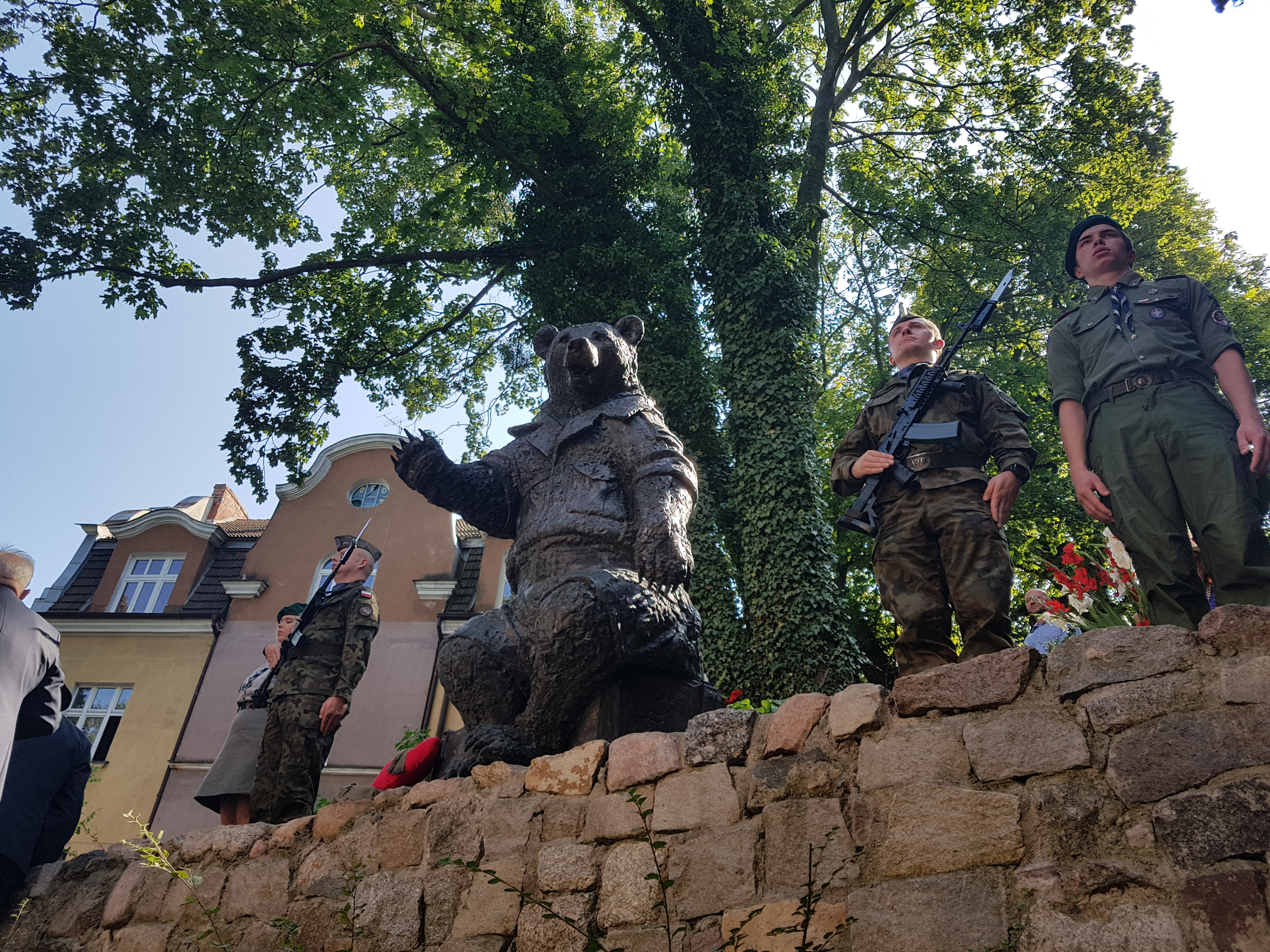 Odsłonięcie pomnika Misia Wojtka w Sopocie 1 września 2019